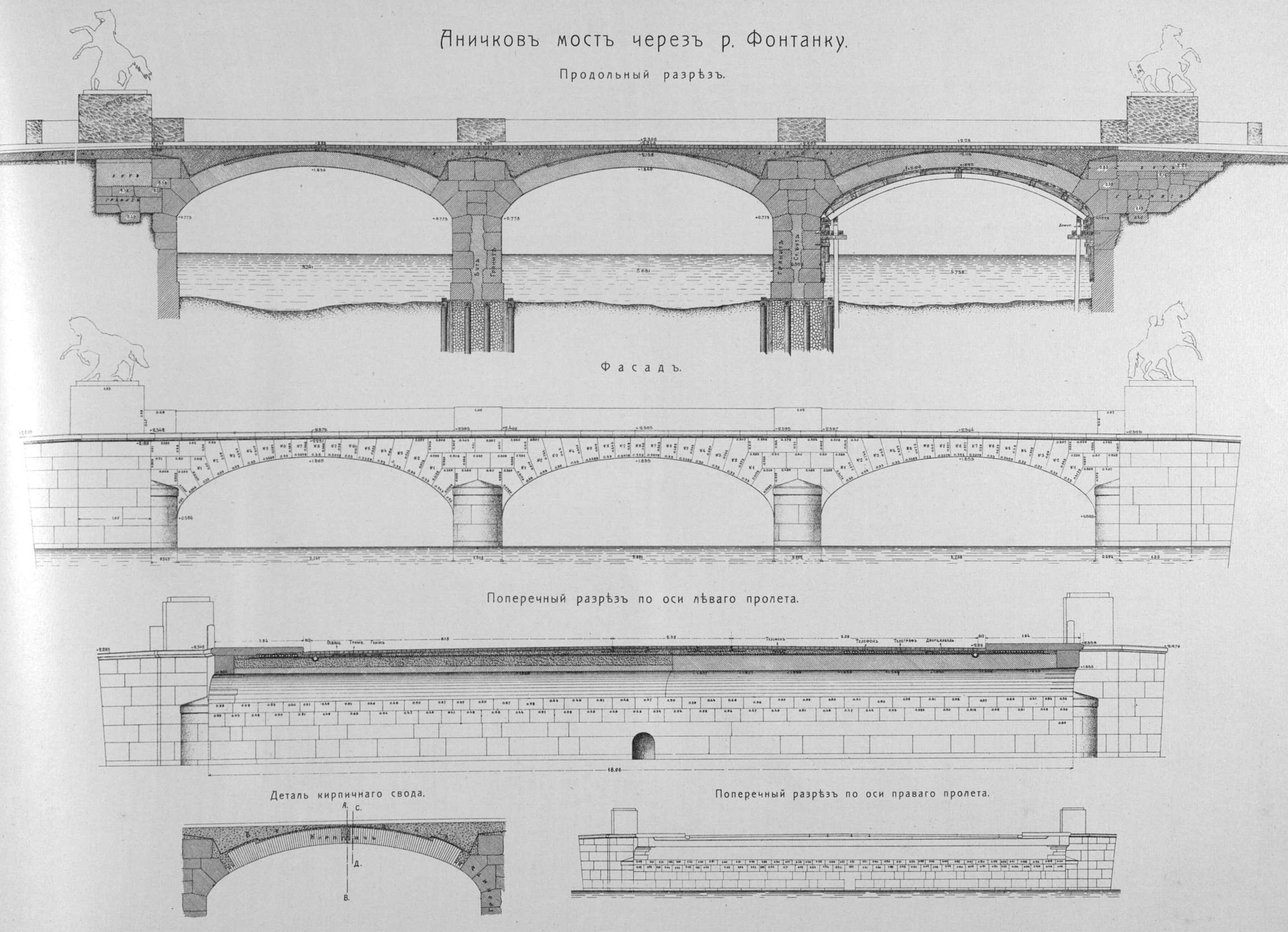 Аничков мост через р. Фонтанку после реконструкции 1907— 1908 гг., продольный разрез, поперечный разрез и деталь кирпичного свода